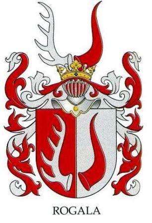 Herb Rogala rodziny Zagórny